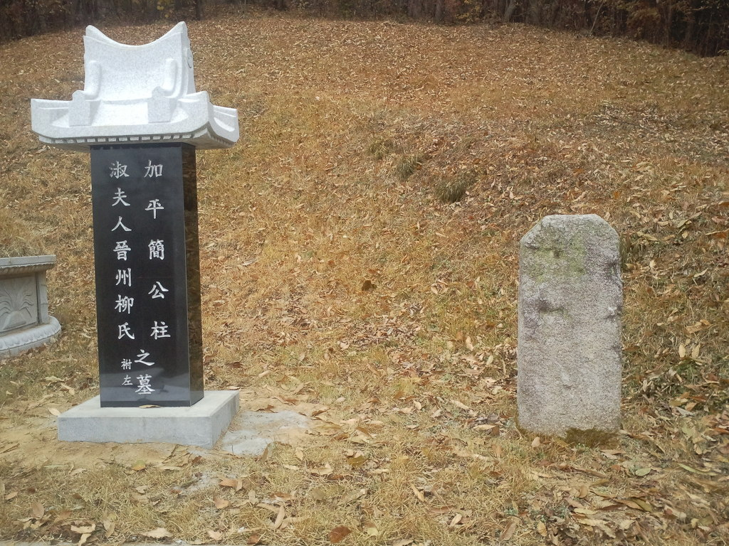 간주(簡柱,3세)之 墓 2